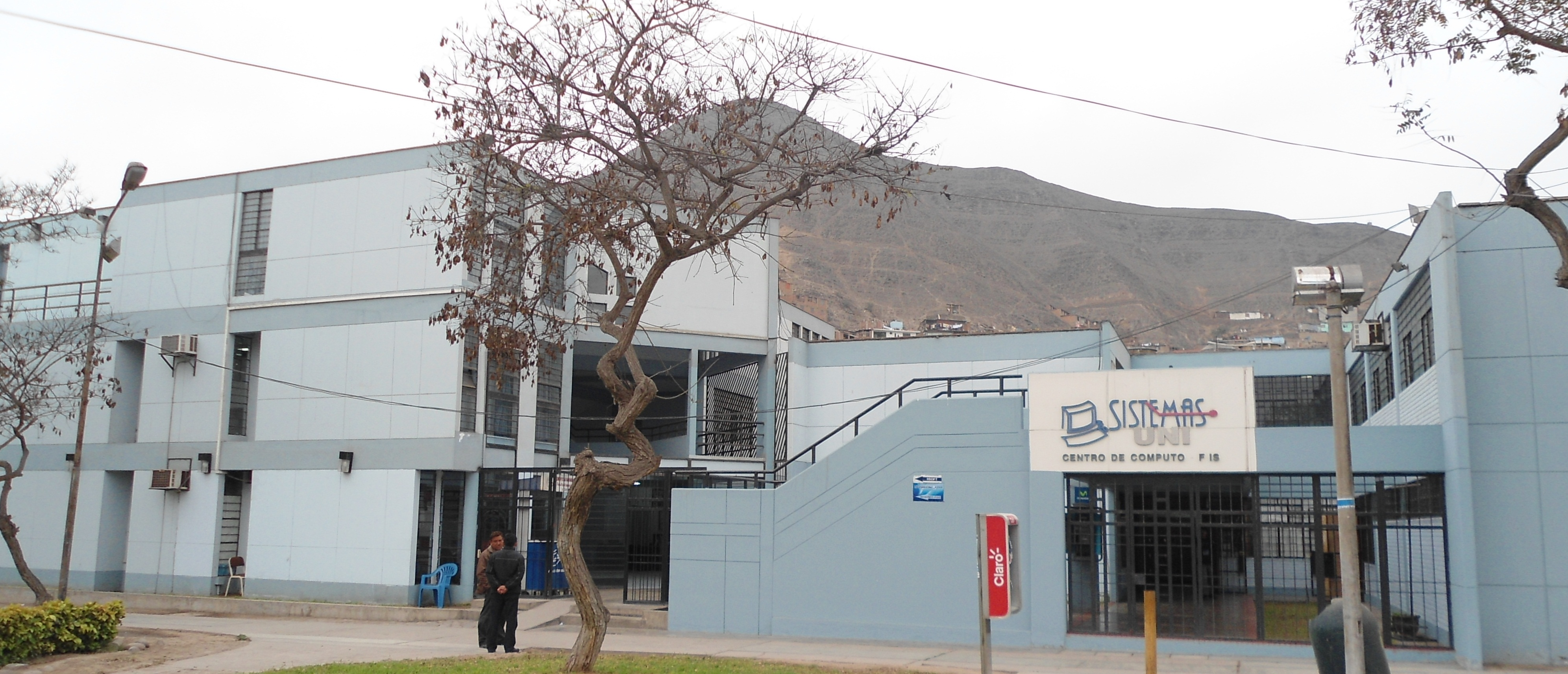 Sistemas UNI: Centro de Cómputo de la FIIS.